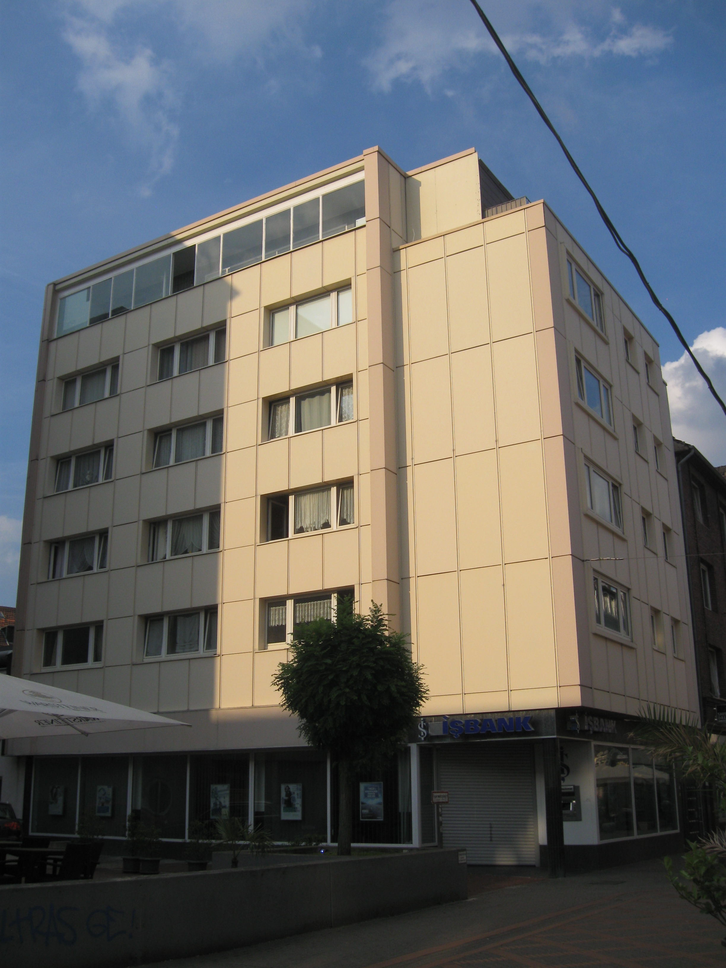 Filiale der İşbank in der Arminstraße 11 in Gelsenkirchen-AltstadtFrüher befand sich an dieser Stelle das 1880 gegründete Bettengeschäft Neuwald. An der jetzt leeren Fassadenfläche des Anfang der 1960er Jahre errichteten Neubaus befand sich bis 2007 eine große Leuchtreklame mit dem Schriftzug „Betten Neuwald“.